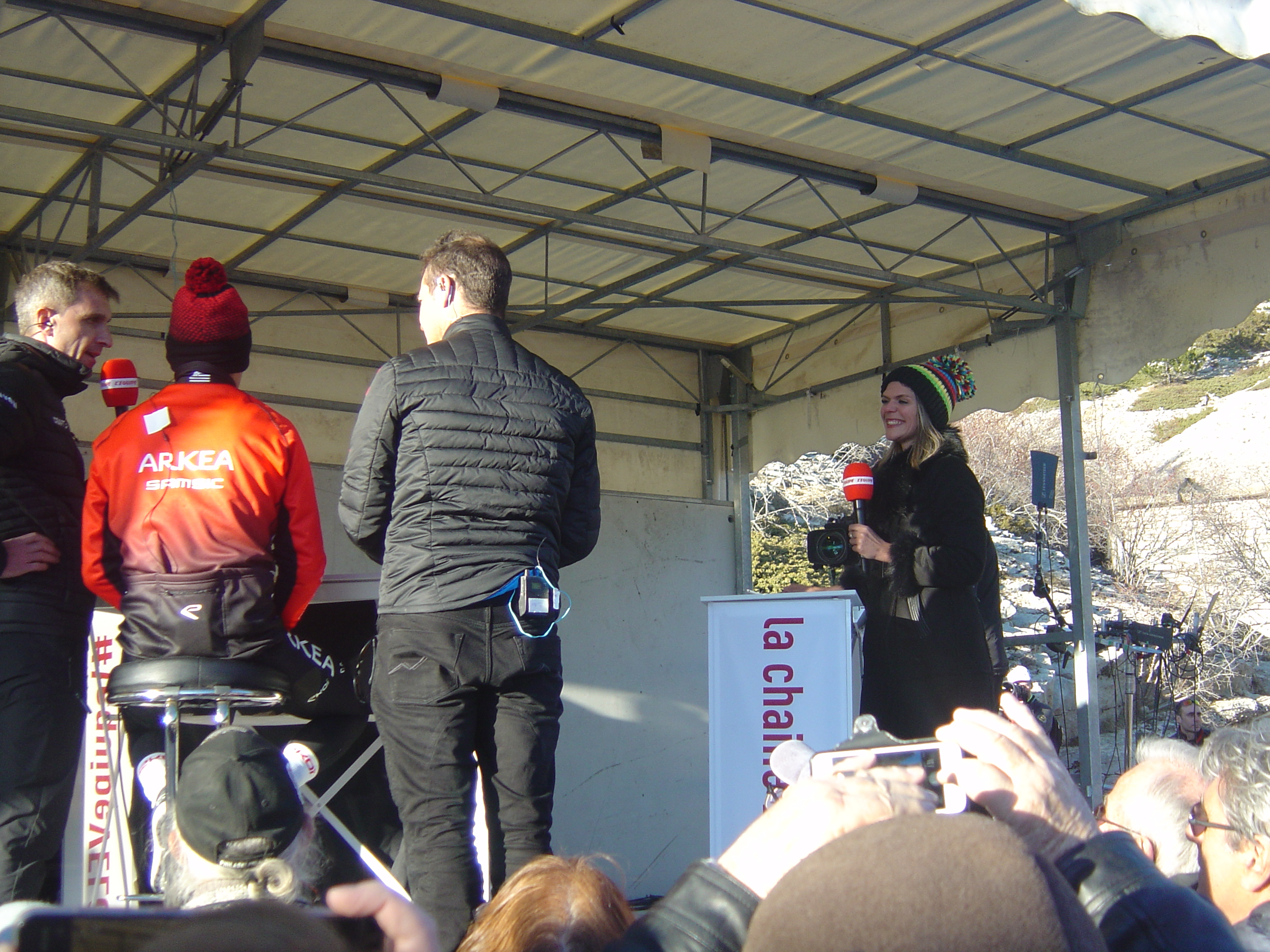 Troisième étape du Tour de Provence 2020. Espace de l'Equipe TV. A droite Claire Bricogne.